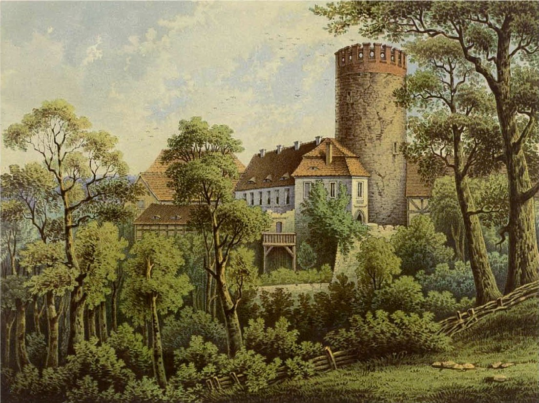 Burg Rabenstein, Kreis Zauche-Belzig, Provinz Brandenburg